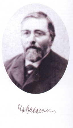 Иван Иванович Рахманинов (1826—1897) — русский математик, ординарный профессор Императорского Киевского университета Св. Владимира, декан физико-математического факультета, ректор университета (1881—1883).